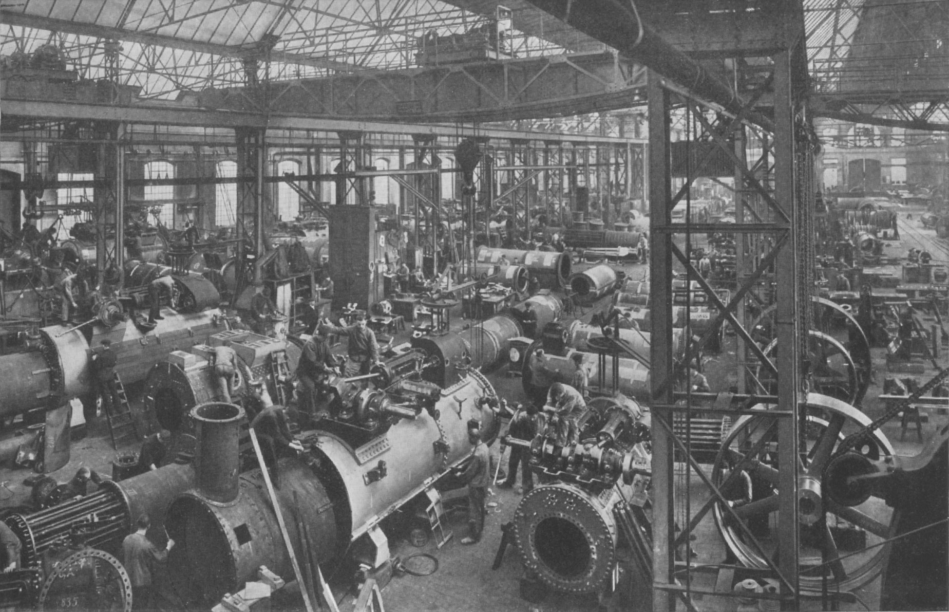 „Heißdampflokomobilbau im Werk Salbke, Montagehalle, Gleichzeitige Montage von 50 Lokomobilen, Flächeninhalt 1800 qm, Belegschaft 190 Mann“ (Originalbeschreibung)